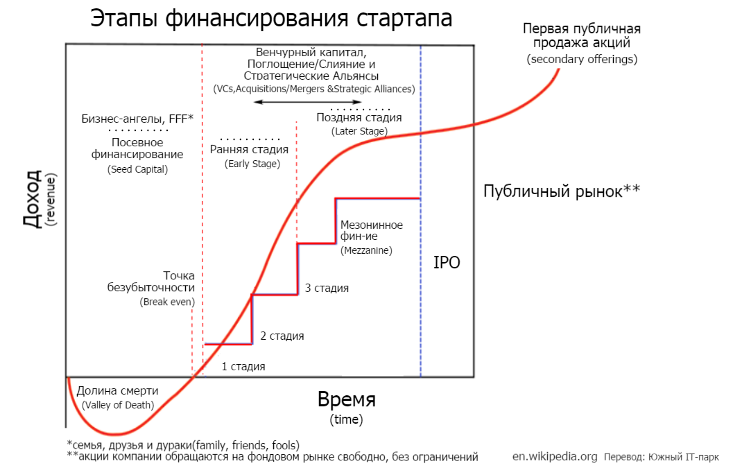 Перевод англоязычной версии изображения.